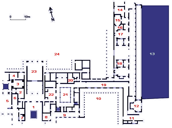 Plant de la Vil·la Popea a Oplontis (Itàlia). 01-Atri 02-Cuina 03-Caldari 04-Tepidari 05-Saló 1 06-Triclini 07-Cubiculum 08-Saló 2 09-Galeria 10-Peristil 11-Passadís 12-Oecus 13-Piscina 14-Hospitalies 15-Viridarium 16-Saló 3 17-Saló 4 18-Saló 5 19-Vestuari 20-Latrina 21-Peristil 22-Larari 23-Saló nord 24-Jardí